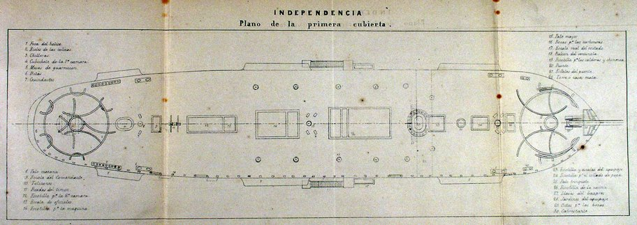 Plano del perfil de la fragata blindada peruana Independencia (Primera cubierta. Vista de la artillería de proa y popa).